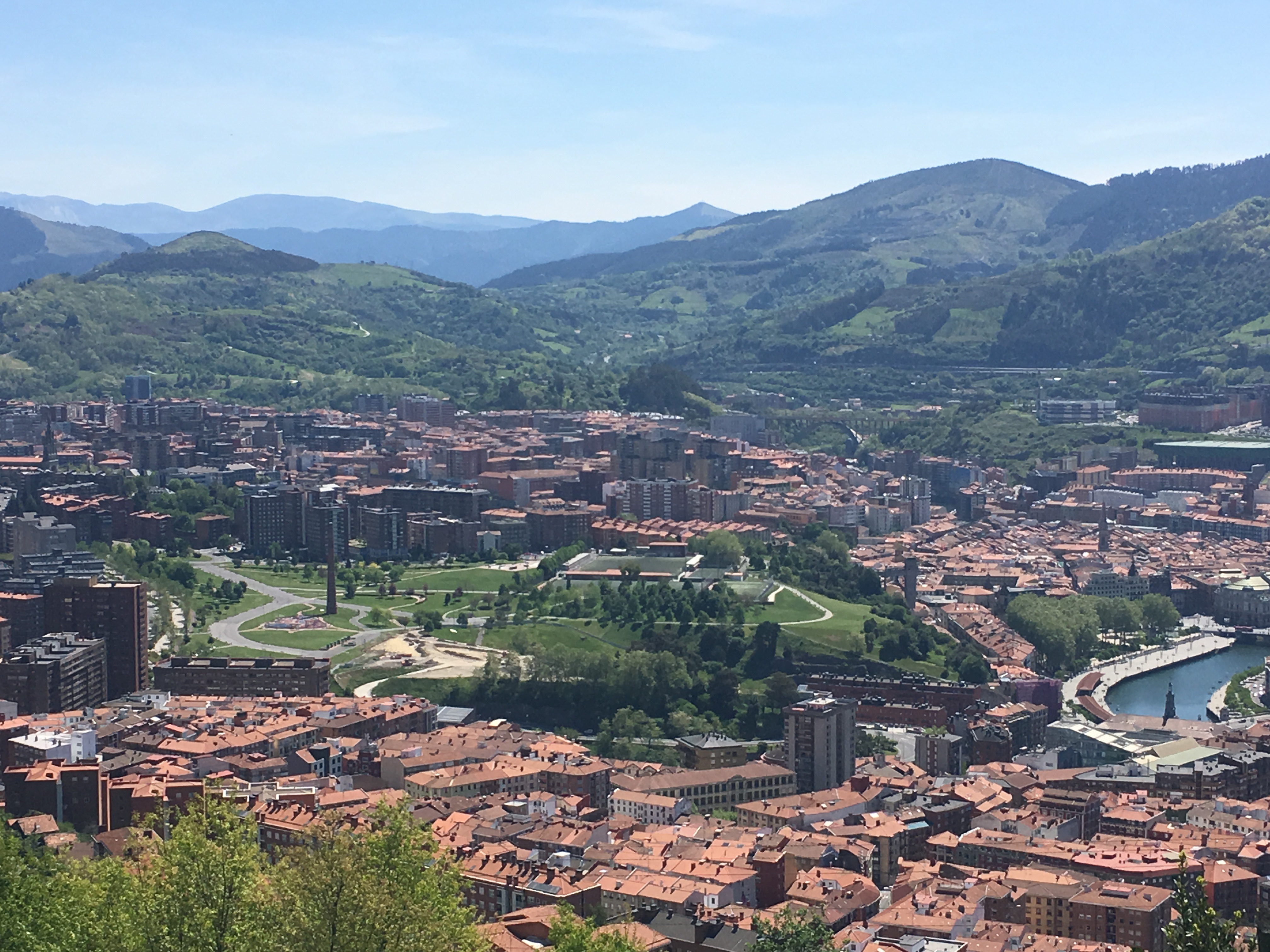 Bilbao